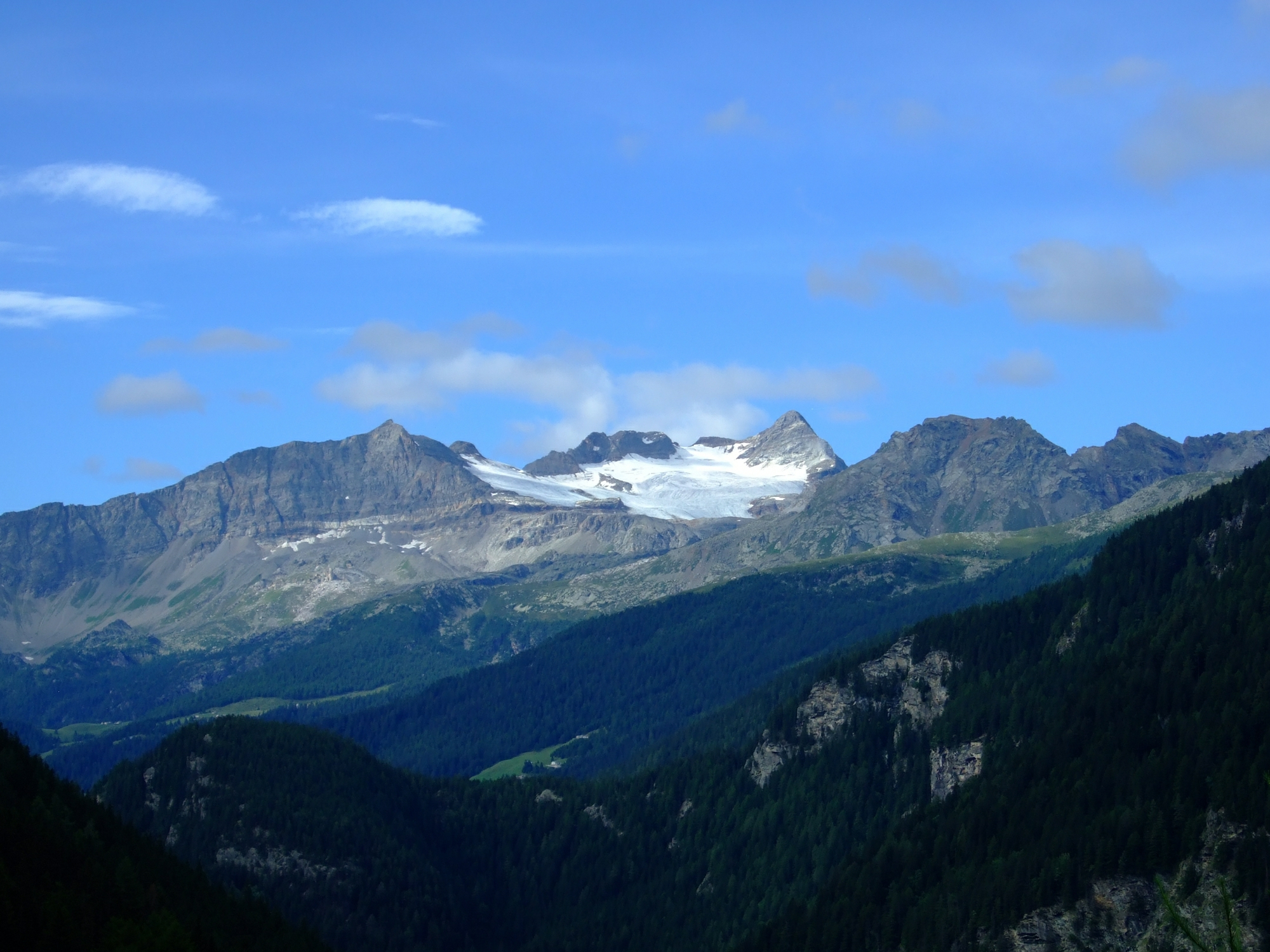 Piz Cancian und Piz Scalino und Scalinogletscher, Valposchiavo, Schweiz, von Sfazu aus gesehen im August 2008